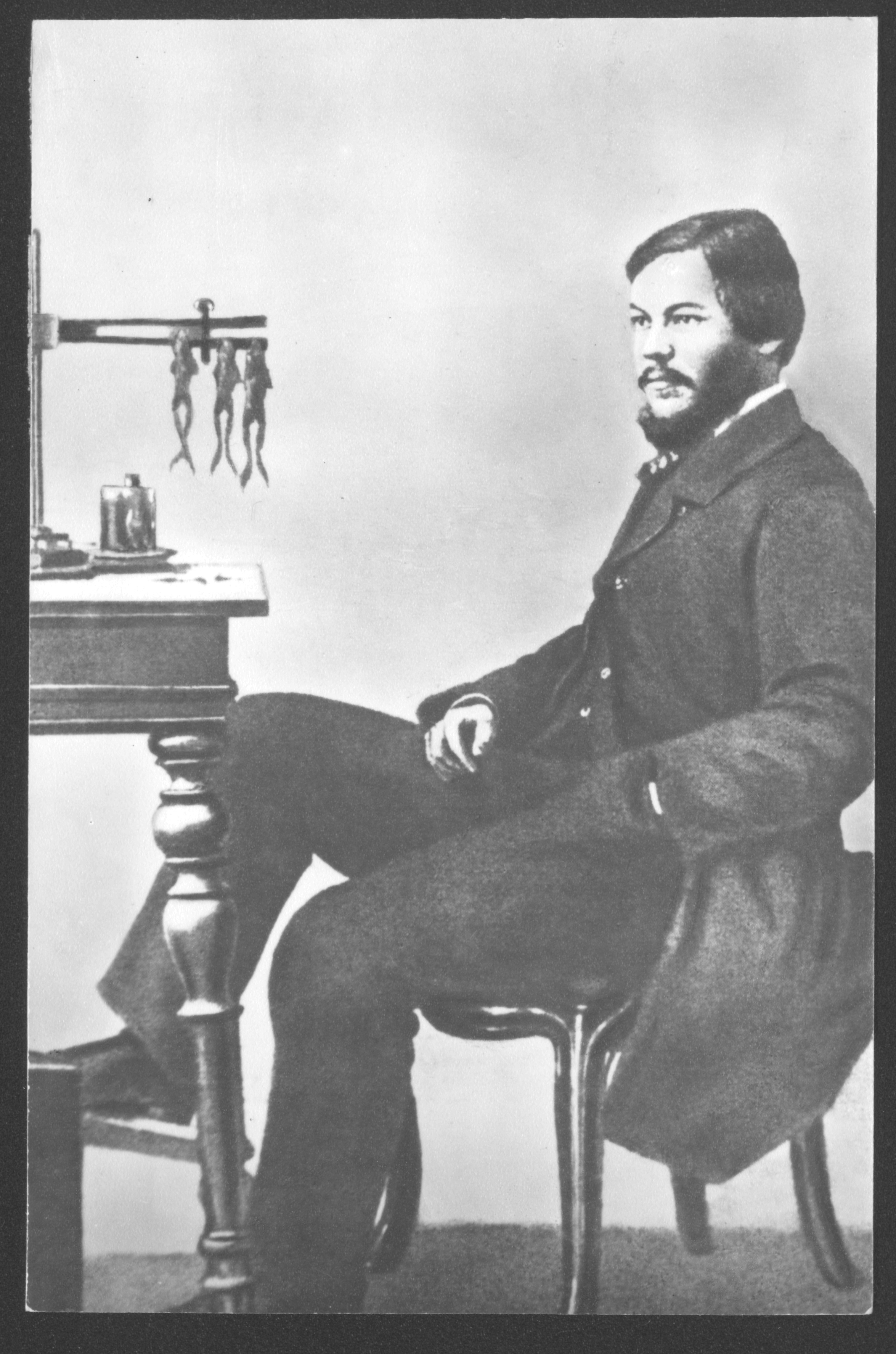 Фотография русского физиолога И. М. Сеченова в бытность профессором Медико-хирургической академии в Санкт-Петербурге